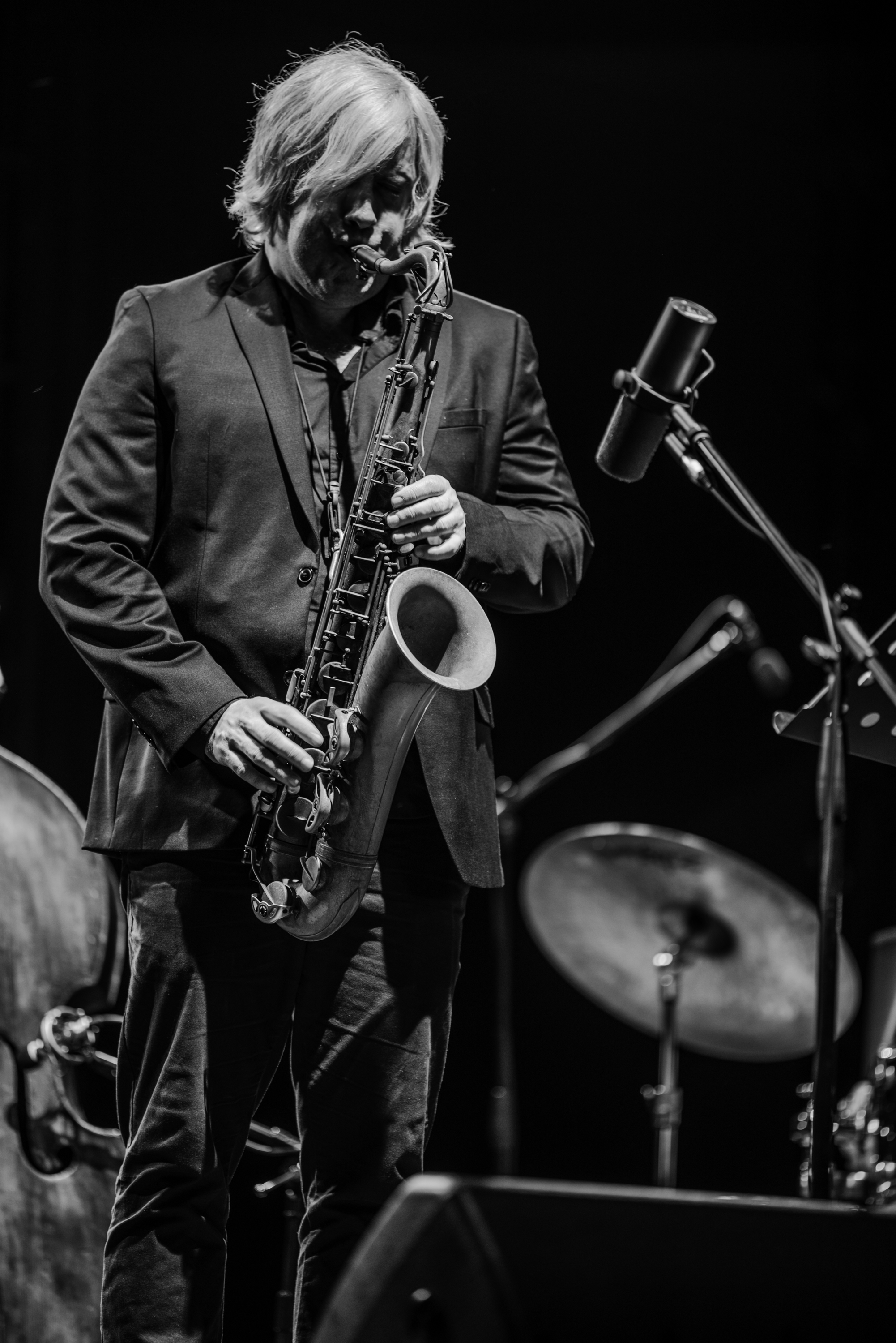 BRUCE HARRIS Quartet Tribute to the Group of "CLIFFORD BROWN and MAX ROACH" • Emmet COHEN / Piano • Clovis NICHOLAS / Bass • Pete Van NOSTRAND / Battery • Bruce HARRIS / Trumpet Special guest: • Grant STEWART / Tenor Saxo 22 Festival Internacional de Jazz de Punta del Este. El Sosiego, Punta del Este, Maldonado, Uruguay. Camera: NIKON D810 Lens: Zeiss Apo Sonnar T* 2/135 ZF.2 0 ISO: 64